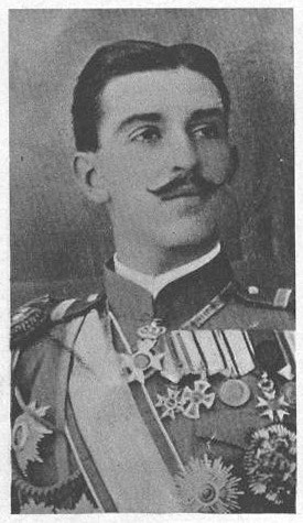 le_prince_Pierre_de_Monténégro commandant des forces militaires au Monténégro présenté dans le journal Le Miroir N°45, page 6.